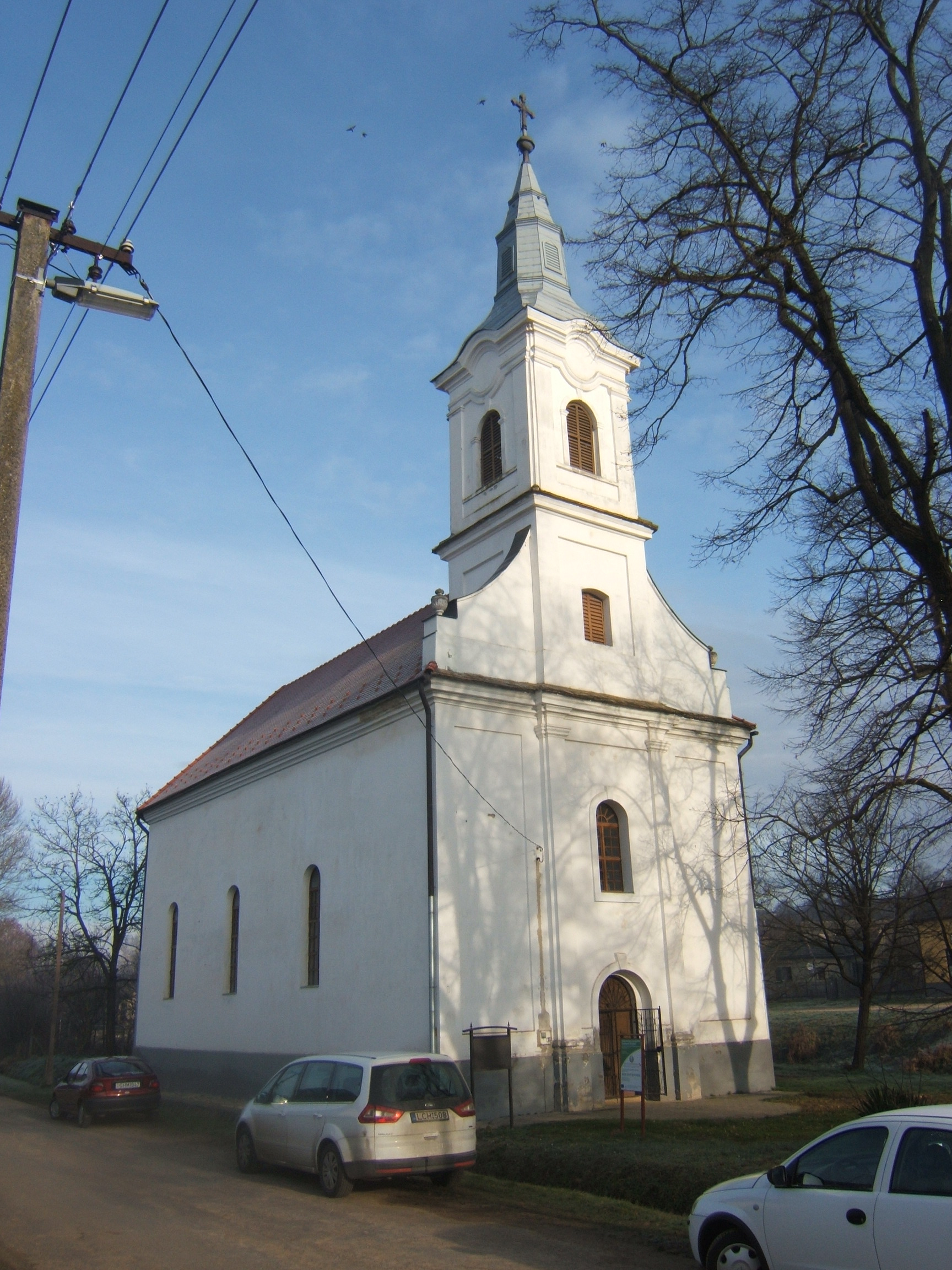 Bábonymegyer egyik temploma